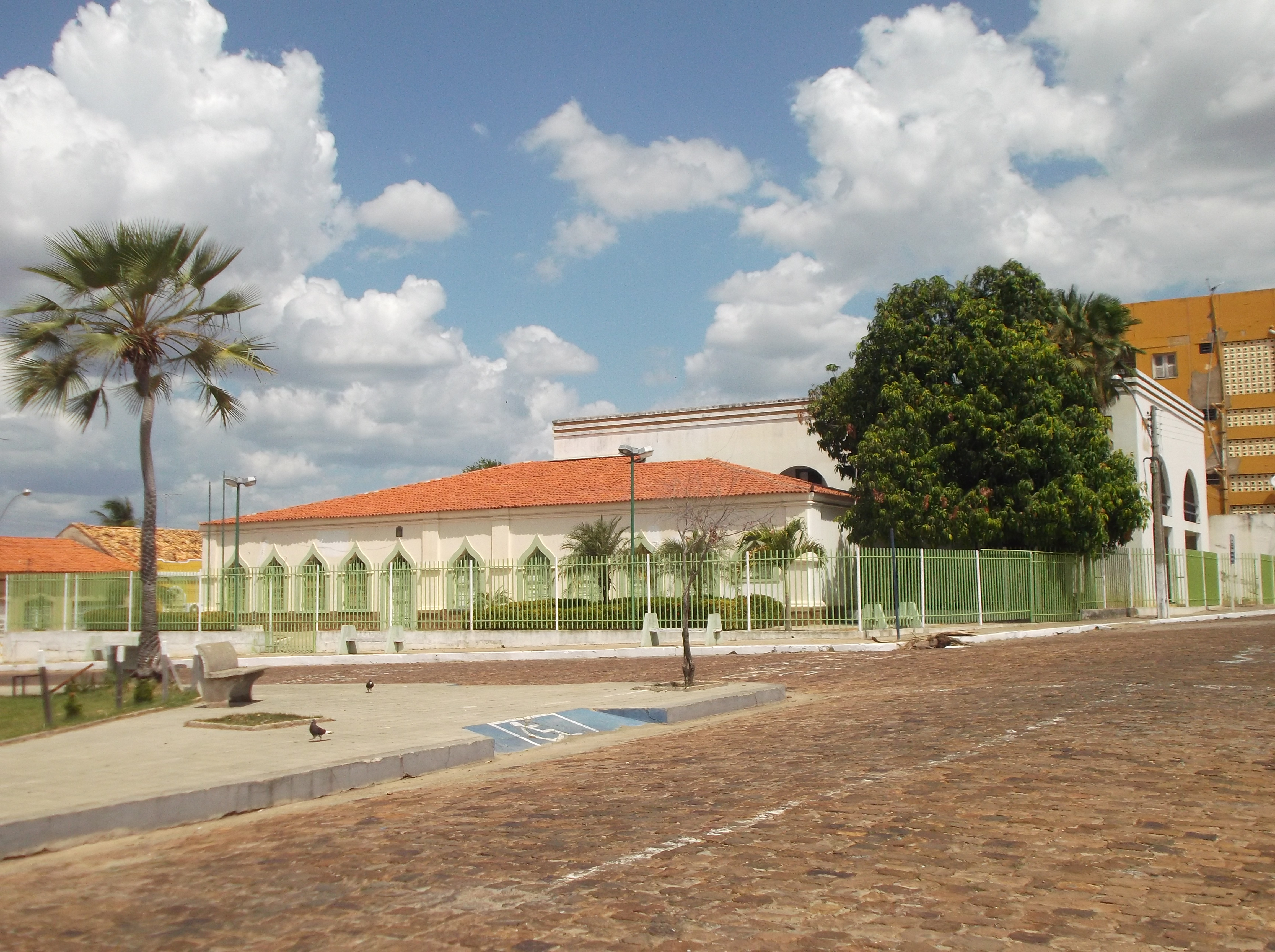 Vista do Palácio do Jenipapo sede da Câmara Municipal de Campo Maior no Piauí.